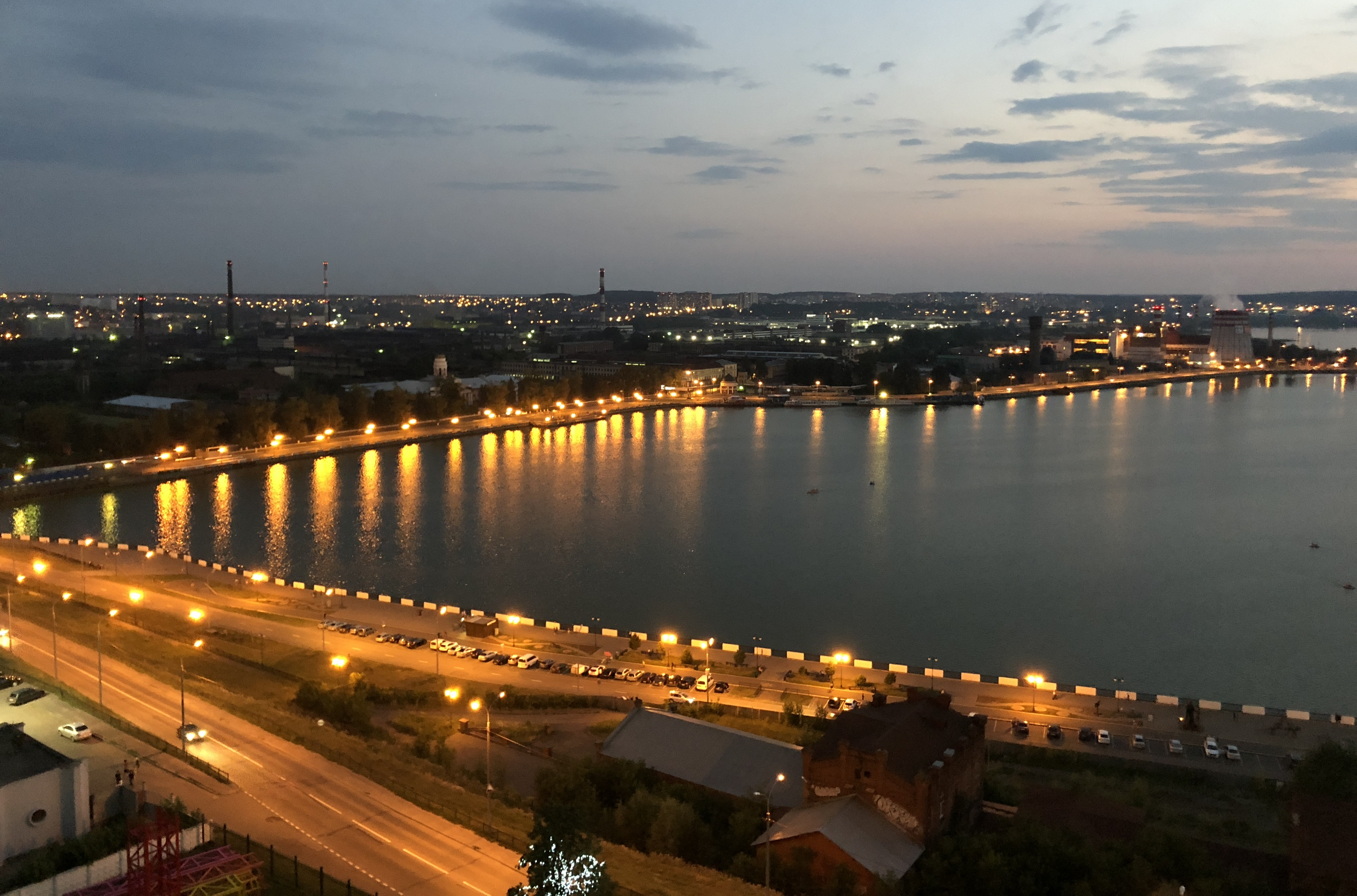 Вид на Ижевский пруд